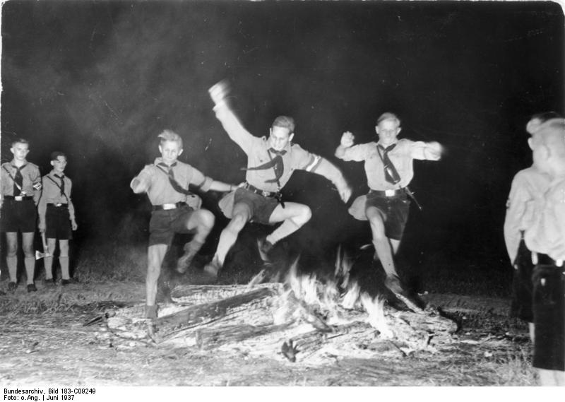 Der Sprung durch das Sonnenwendfeuer Berliner HJ feierte auf der Ravensteiner Wiese bei Friedrichshagen das Fest der Sommersonnenwende. Scherl Bilderdienst Berlin. 27.6.1937